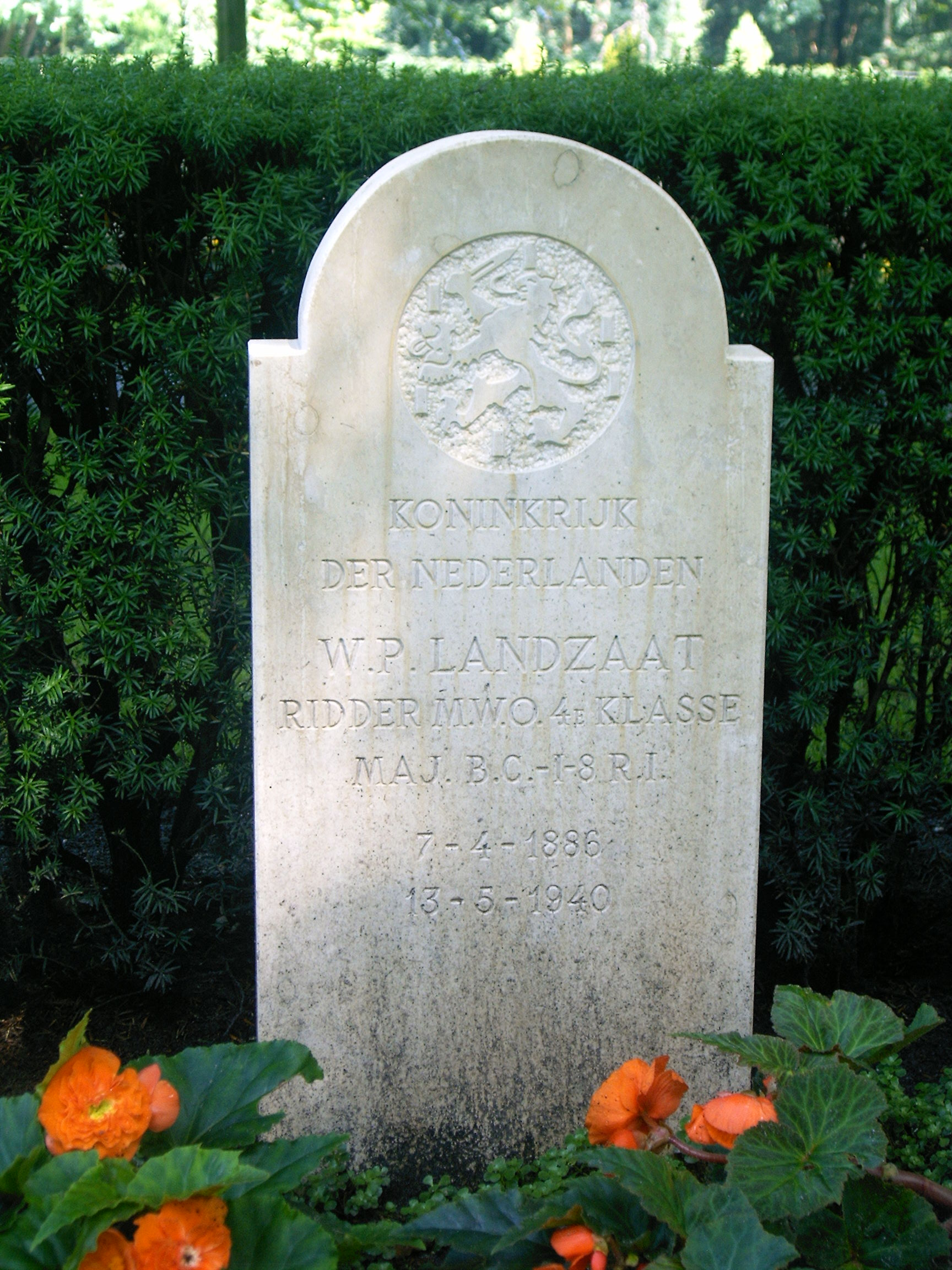 Grafzerk van W.P Landzaat